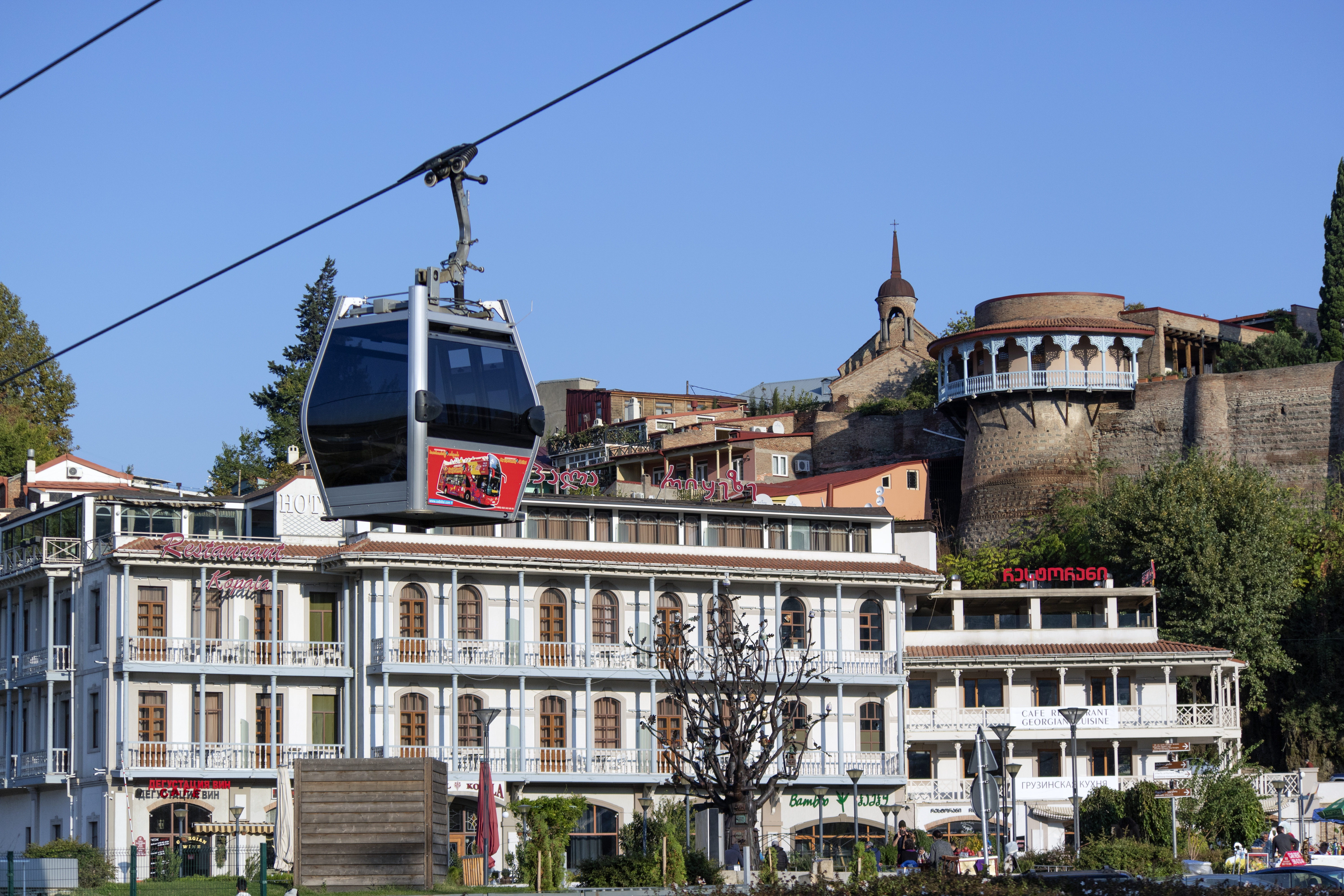 Tiflis Gürcistan'ın başkenti olup, Kura Irmağı'nın her iki yakasında yer alır. Kent, 350 km²'lik bir alana yayılır. Nüfusu 1.345.000 kişidir.